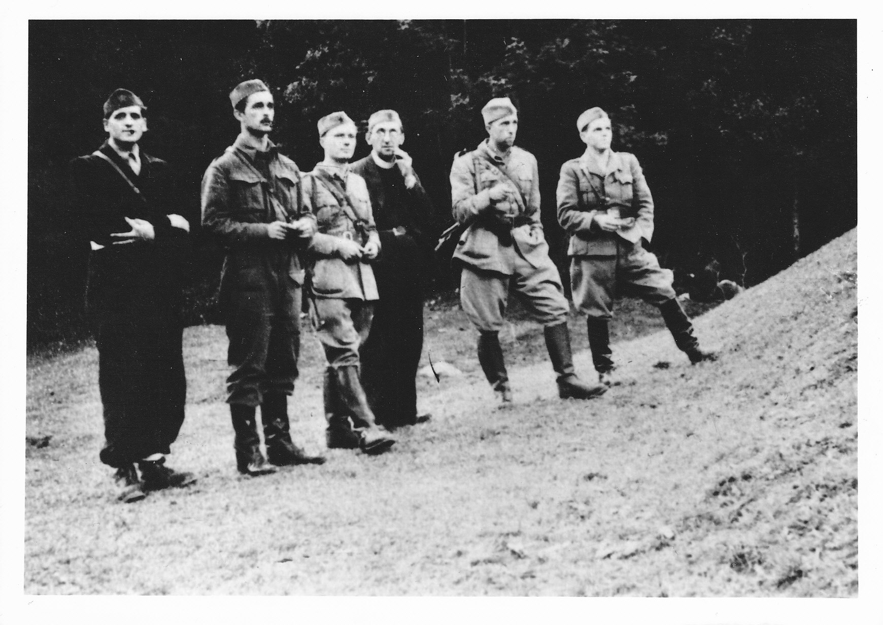 Od leve proti desni: Anton Vratuša (namestnik komandanta Rabske Brigade), Karel Destovnik Kajuh, Dr. Jože Brilej - Bolko (polit.komisar XIV divizije), Jose Lampret (vojni kurat XIV.divizije), Mirko Bračič (komandant brigade) in Franc Rozman - Stane (komandant glavnega štaba NOV in POS)